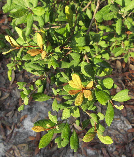 lyonia ferruginea